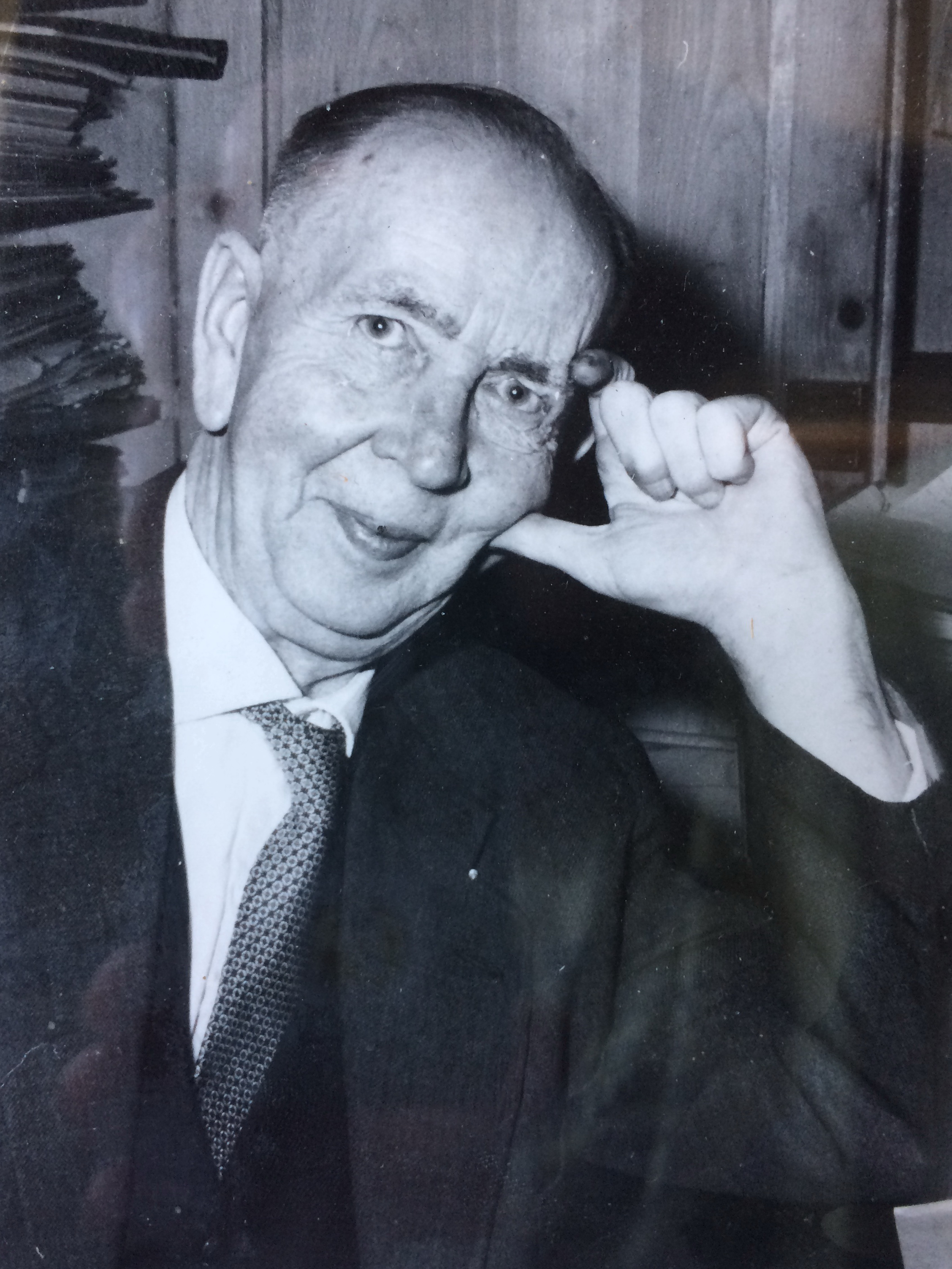 Ein Portrait, welches nur wenige Monate vor seinem Tod entstand.